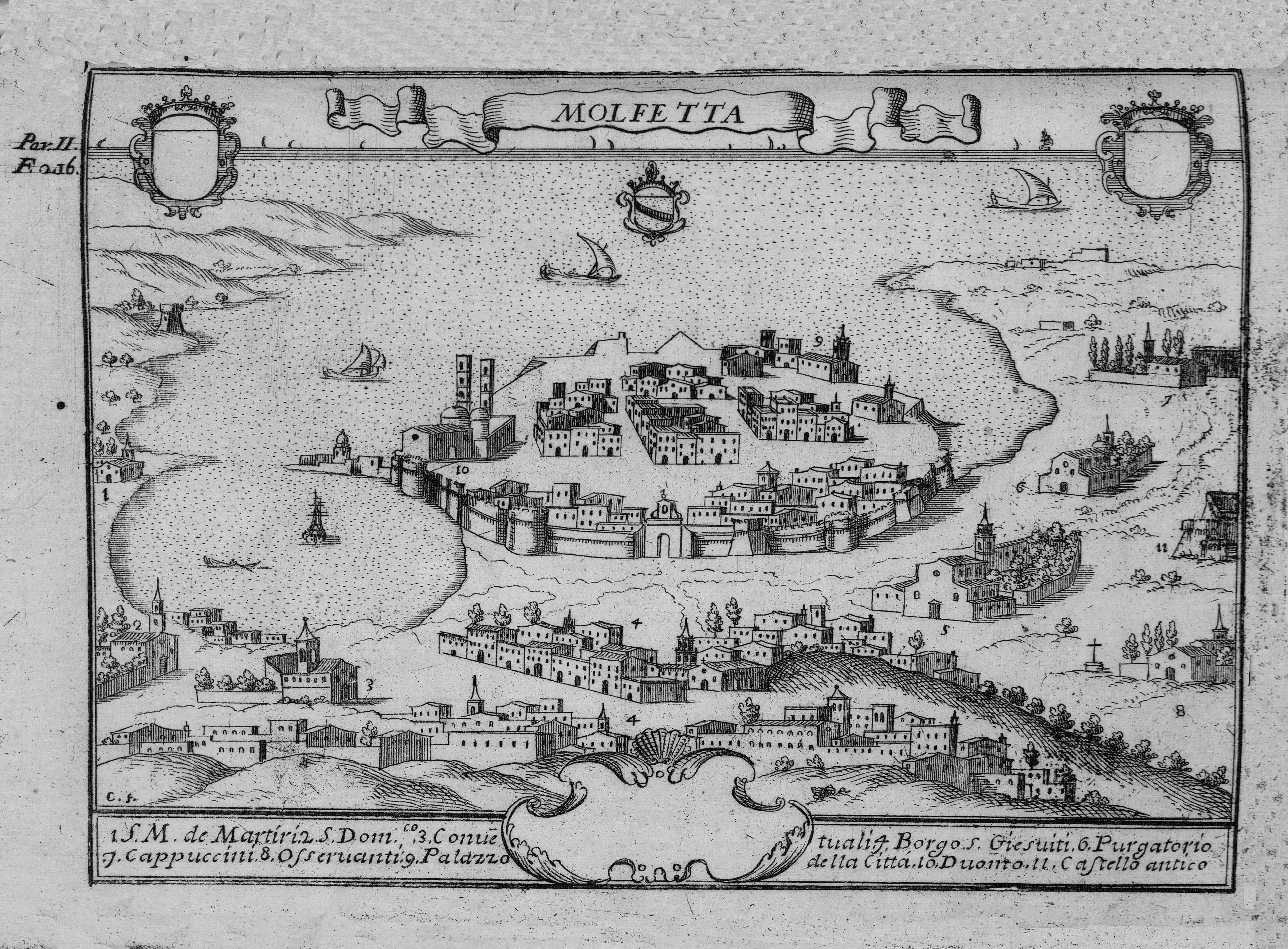 Autor: Pacichelli, Giovanni Battista, 1641-1702 Descripción bibliográfica: Il regno di Napoli in prospettiva : diviso in dodeci provincie, in cui si descrivono la sua Metropoli Fidelissima città di Napoli ... Opera postuma divisa in tre parti / dell'abatte Gio. Battista Pacichelli ; Parte prima [-terza] ... Del regno di Napoli in prospettiva / dell'abate Pacichelli. Parte prima. - In Napoli : nella Stamperia di Michele Luigi Mutio, 1703. - v. : principalmente il.; 4º . - Inic. adorn. y frisos dec. - Grab. calc. y h. pleg. grab. calc. de mapas de Cassianus de Silva. Ilustrador: Cassiano De Silva, Francesco, il. Impresor: Muzio, Michele Luigi, imp. Lugar de impresión: Italia. Nápoles Localización: Vea la ilustración en su contexto